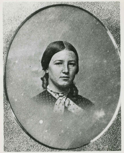 Louisa Parsons Hopkins